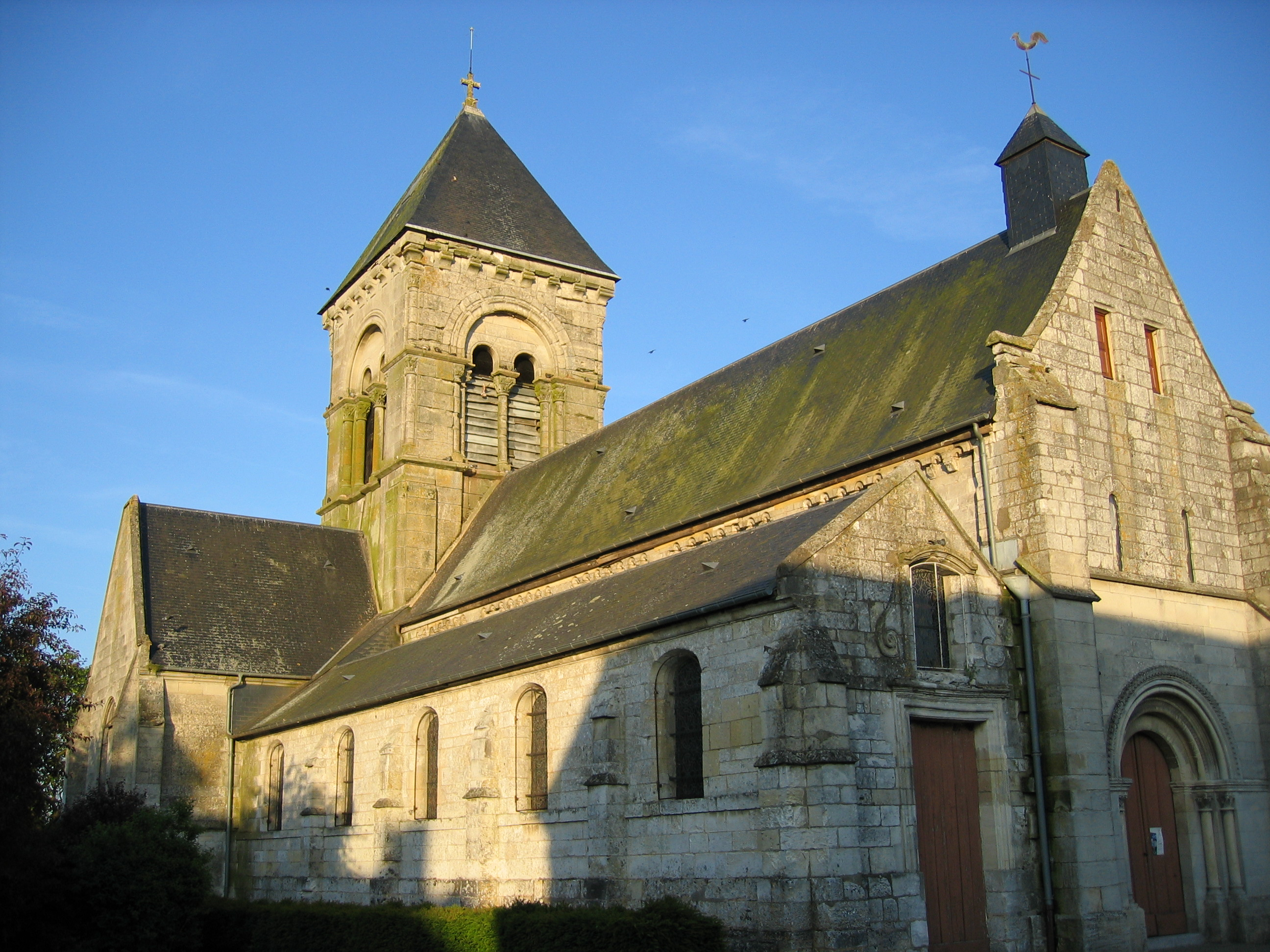 L'église Saint-Paterne à Hauville (27), prise en juin 2005. Sawyer